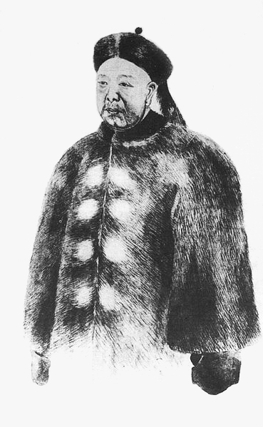 立山（1843年?－1900年），本名杨立山，字豫甫，土默特氏，蒙古正黄旗人，晚清官员。